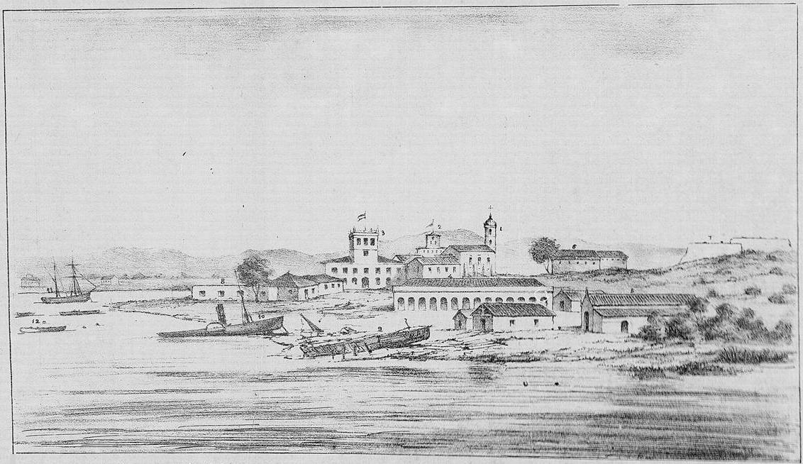 Vista de uma parte da cidade de Assunção, tirada a bordo de um dos monitores pelo 2º ten. José Carlos de Carvalho, imediato do monitor Rio Grande. Legenda: 1º Palácio do P. Lopéz. - 2º Palácio do velho Lopéz. - 3º Igreja de S. Francisco. - 4º Alfandega. - 5º Arsenal. - 6º Theatro. - 7º Forte com 5 peças pequenas. - 8º Batteria acazamatada. - 9º Vapor em construção. - 10º Vapor em conserto. 11º Escunas Italiana prizioneira. 12º Chalanas com torpedos.